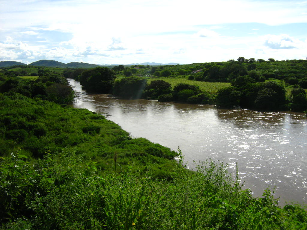 Rio Pajeú